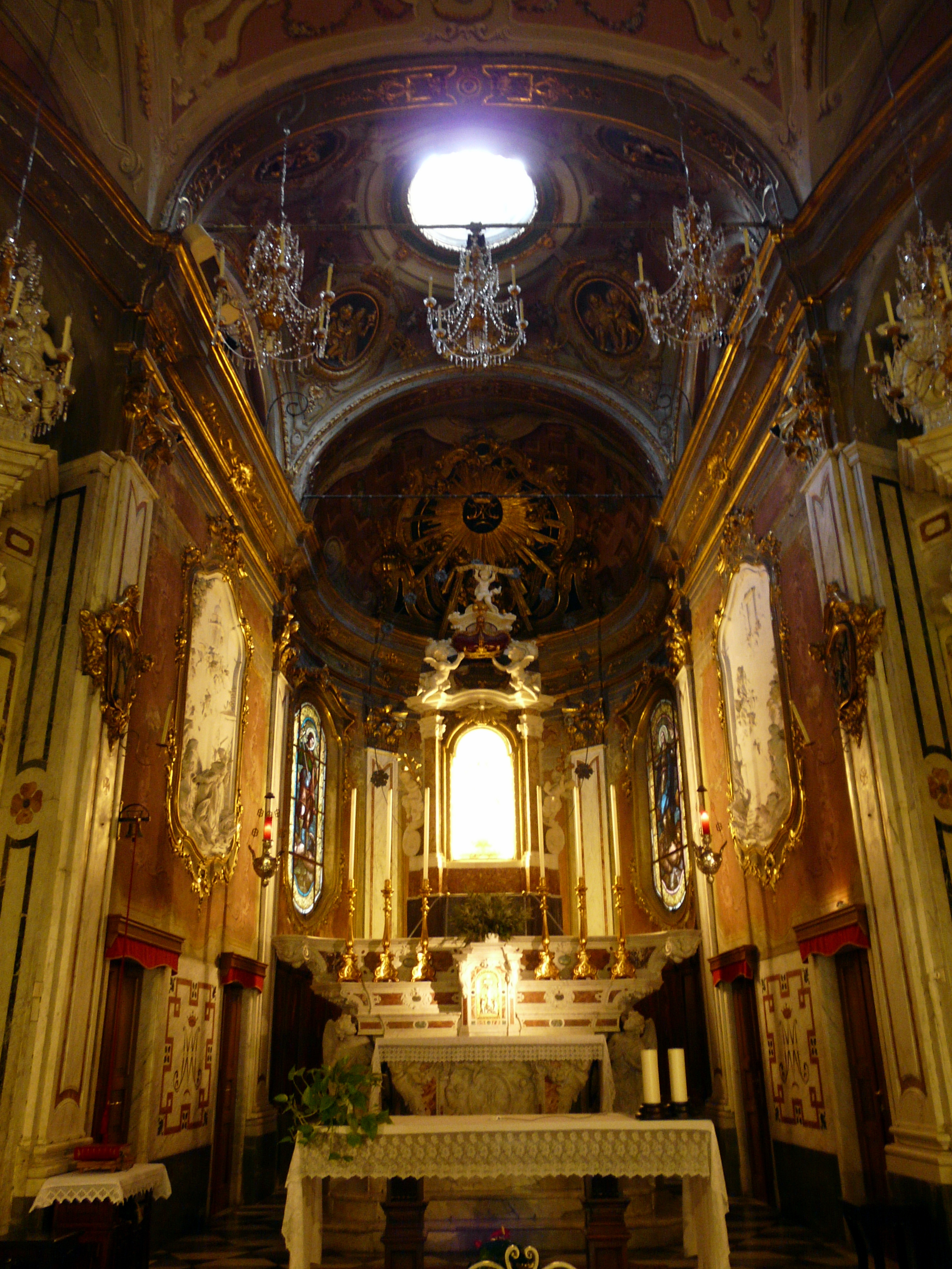 Santuario di Nostra Signora del Suffragio, Recco, Liguria, Italia